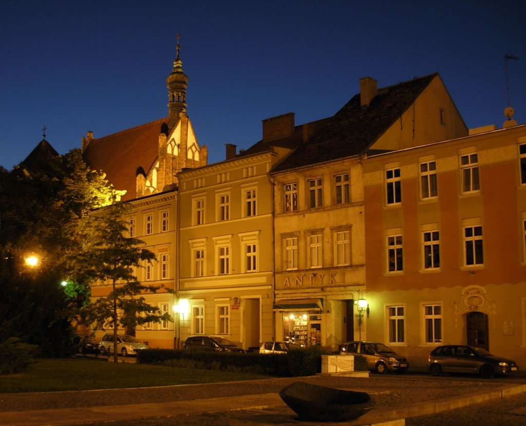 Stary Rynek w Bydgoszczy